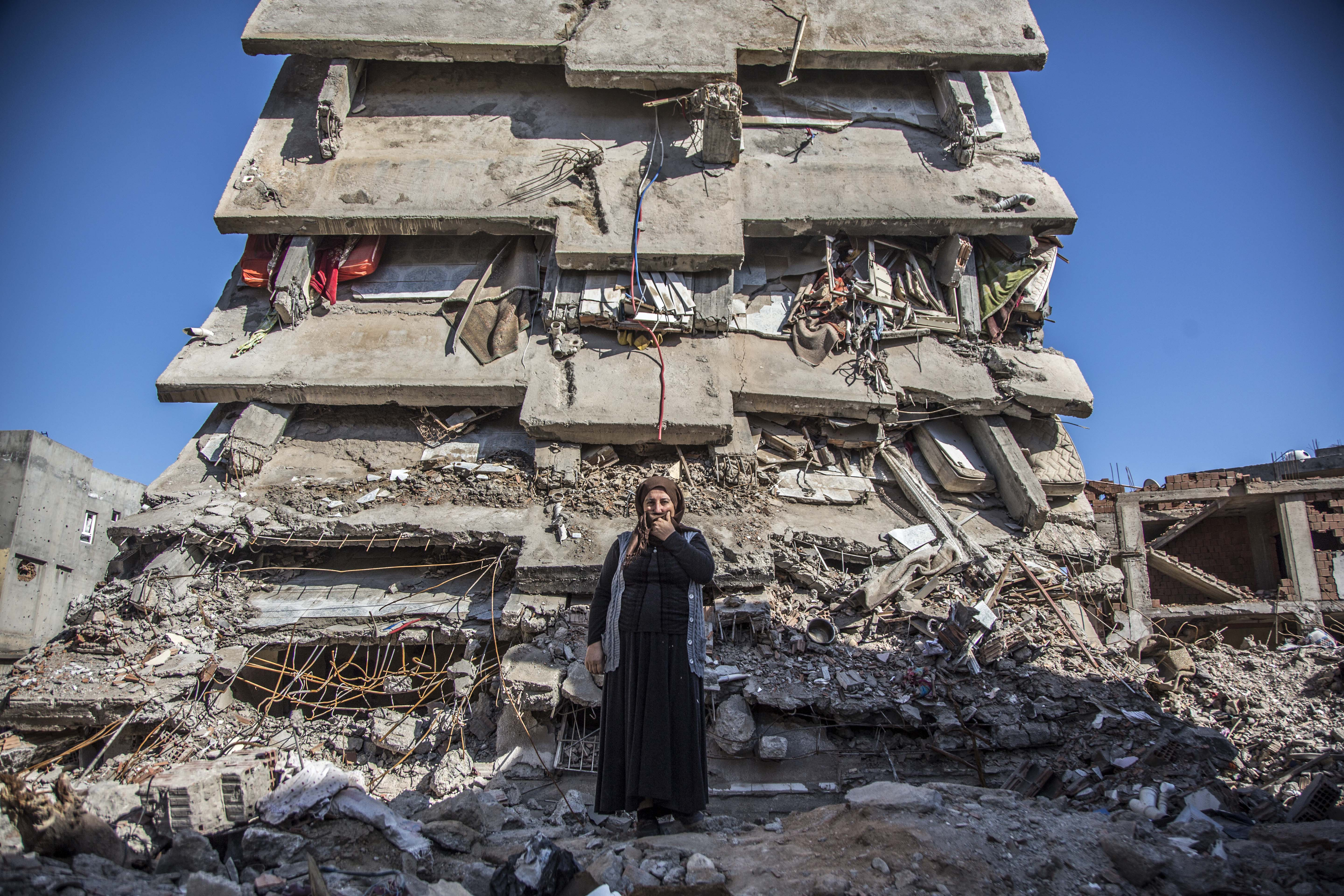 Cizre çatışmaları, 2 Mart 2016